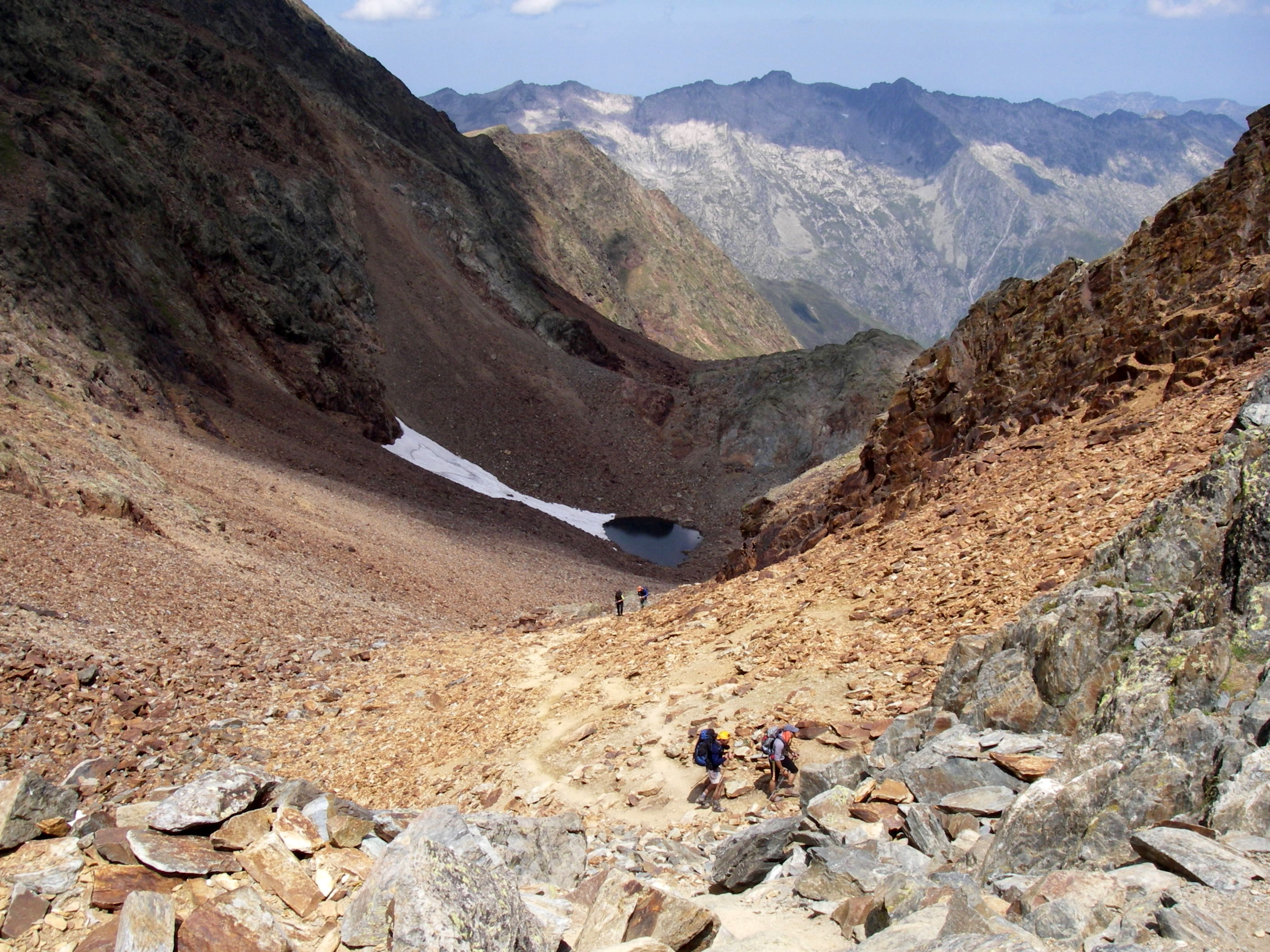 Pica d'Estats (3143m)